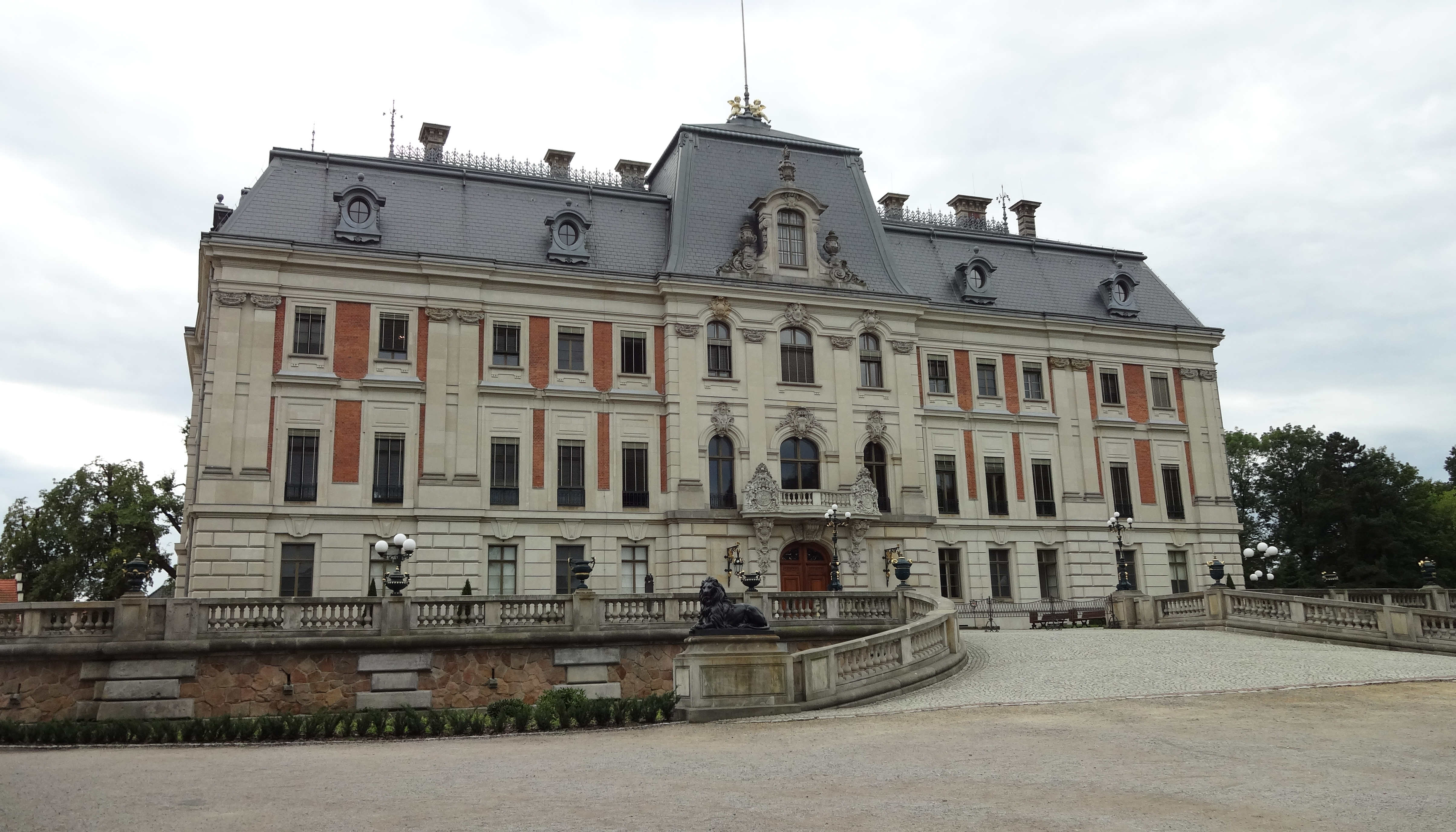 Zamek w Pszczynie od strony północnej